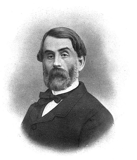 Marco Formentini